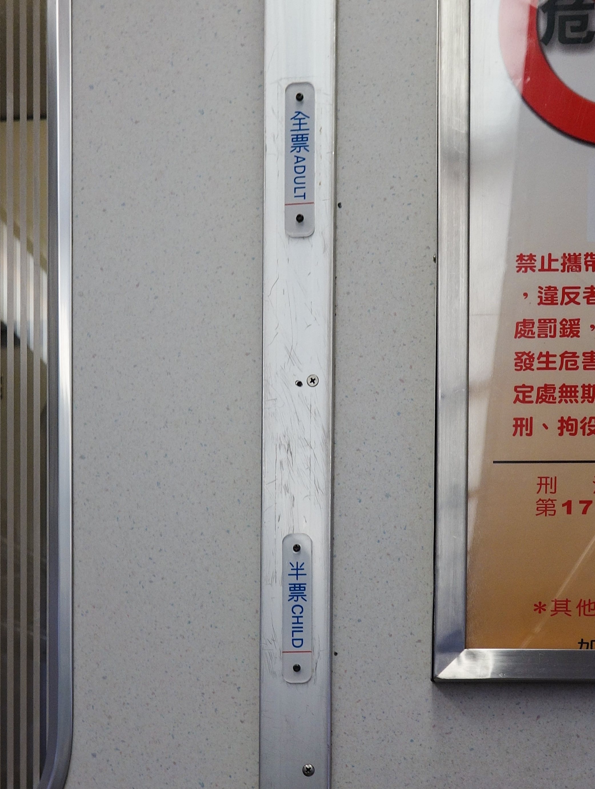 全票と半票の身長表示 （自強号 PPH1309 車内）